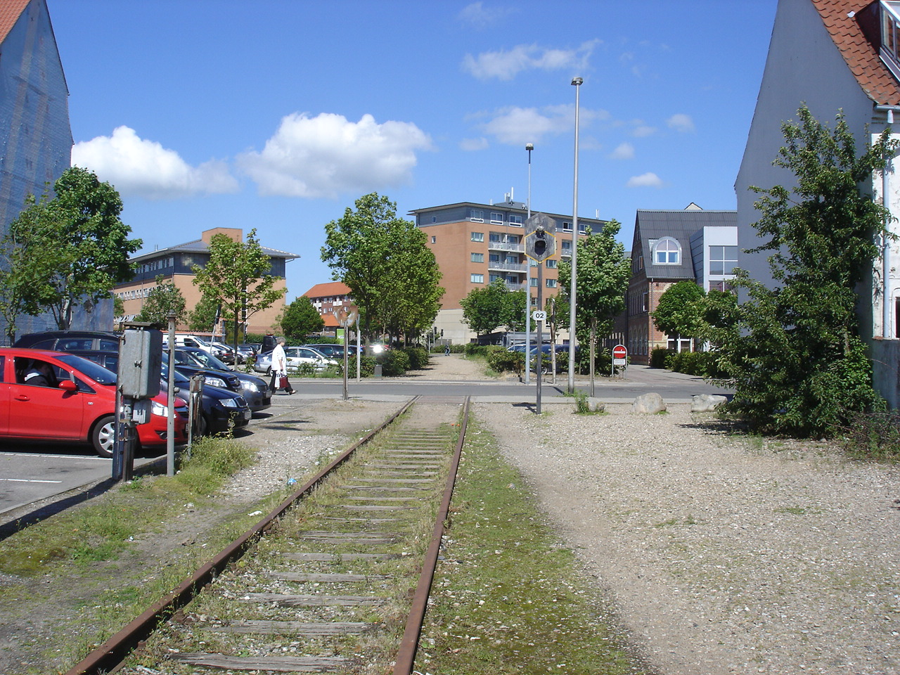 Horsens Havnebane krydser Sønderbrogade, og skinnerne slutter